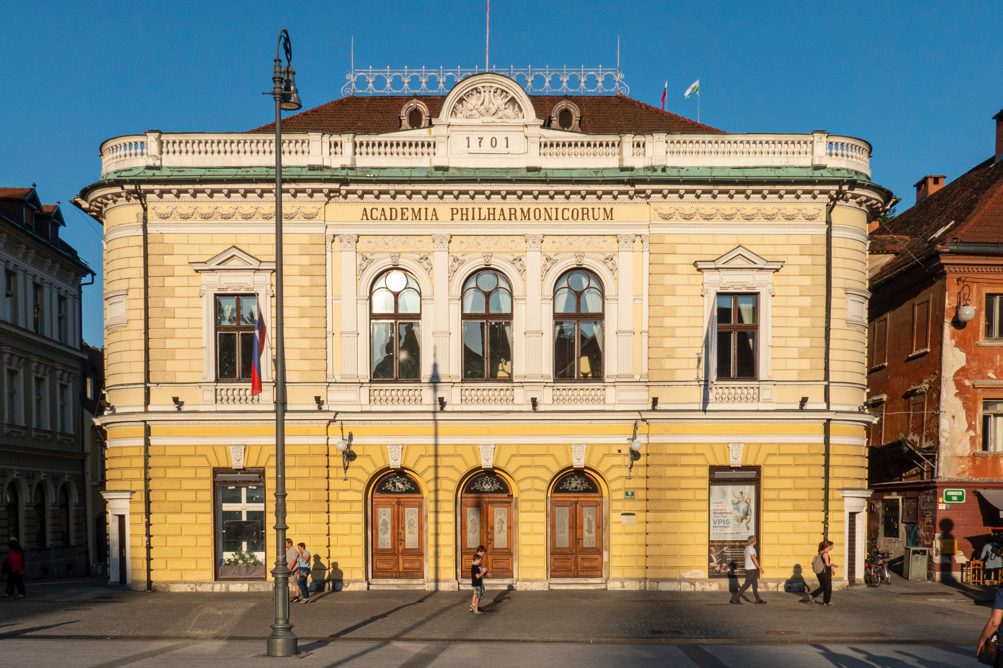 Slowenische Philharmonie Vorderseite